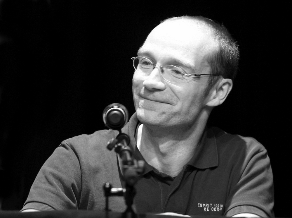 John von Düffel, Schriftsteller, auf der Lit.Cologne 2008